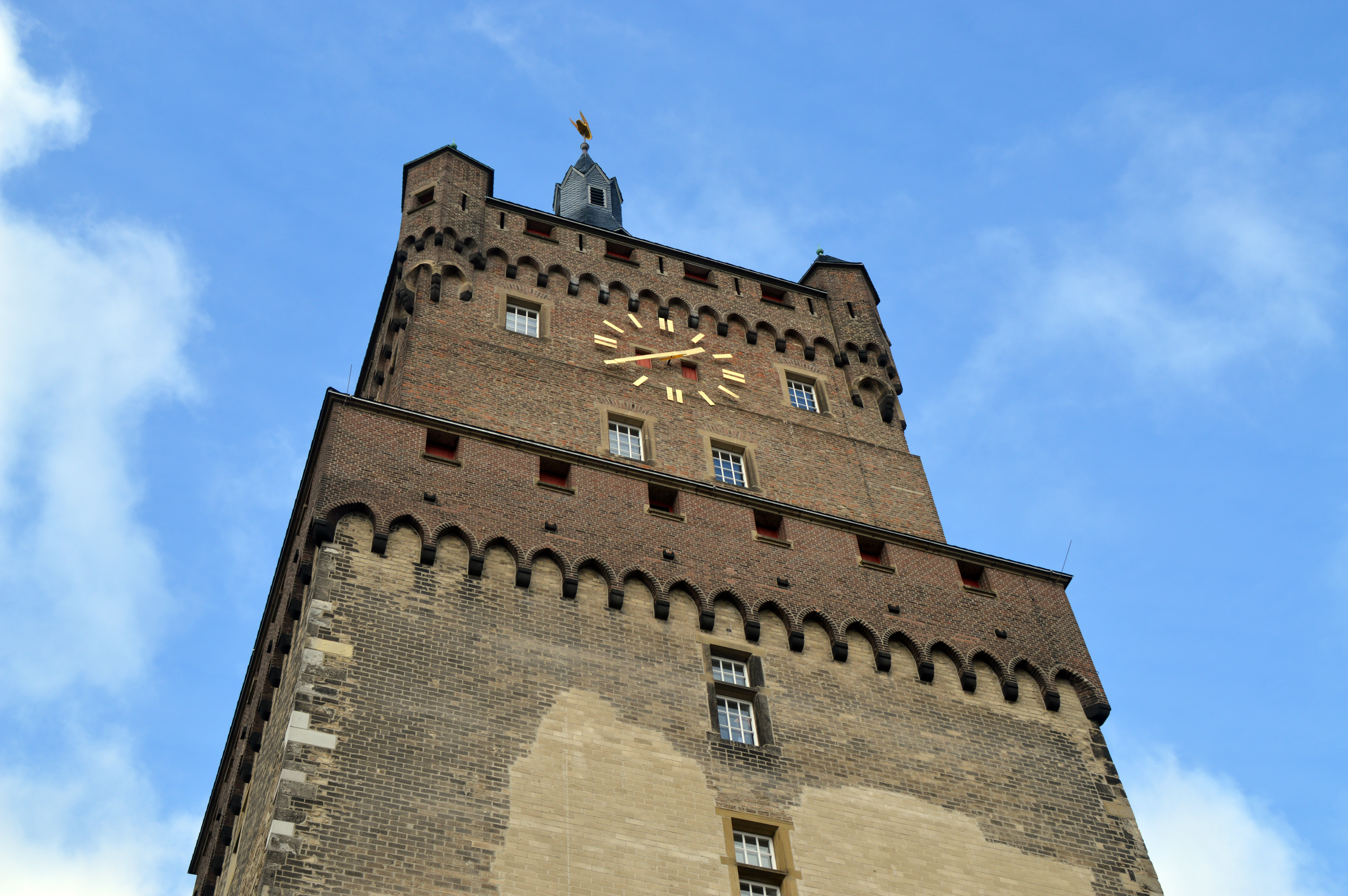 Schwanenburg Castle Kleve, Kleef, Zwanenburcht, Шваненбург (Клеве)